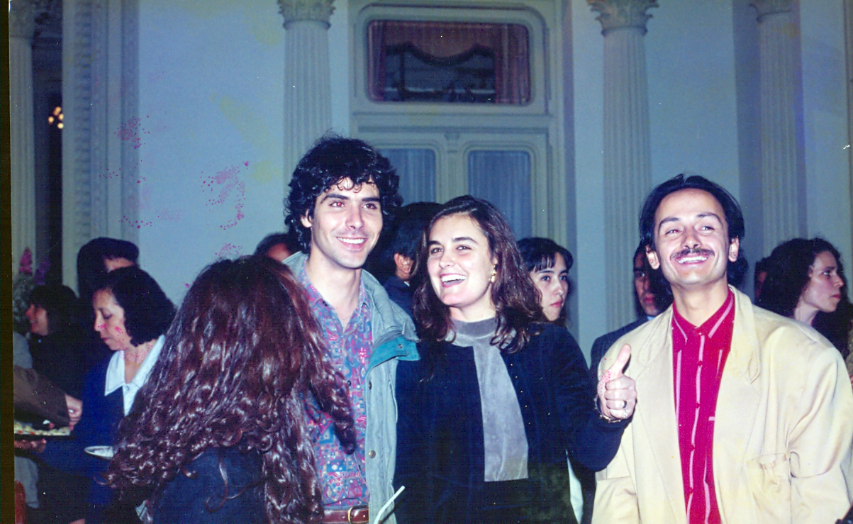 Actor Juan Falcón año 1997.